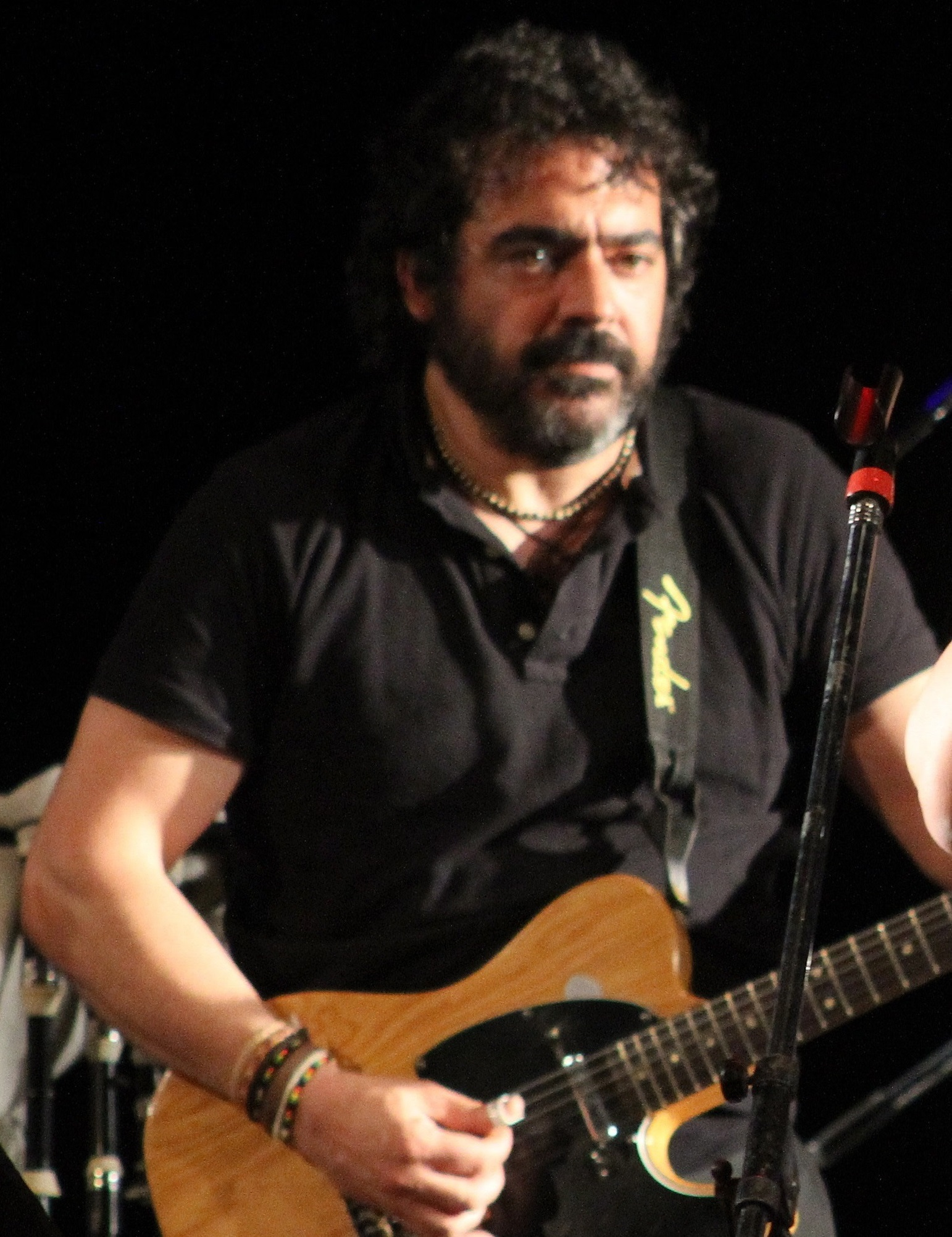 Mar del Plata, 17 de Mayo de 2014. En el marco del MICSUR, se llevó a cabo el espectáculo que pretende mostrar la creatividad musical de Galicia, a través de un elenco de reconocidos artistas gallegos, con un repertorio desde lo tradicional hasta lo contemporáneo.Los artistas del espectáculo son Uxía, Rosa Cedrón, Budiño y Narf. Fotos: Silvina Frydlewsky / Ministerio de Cultura de la Nación